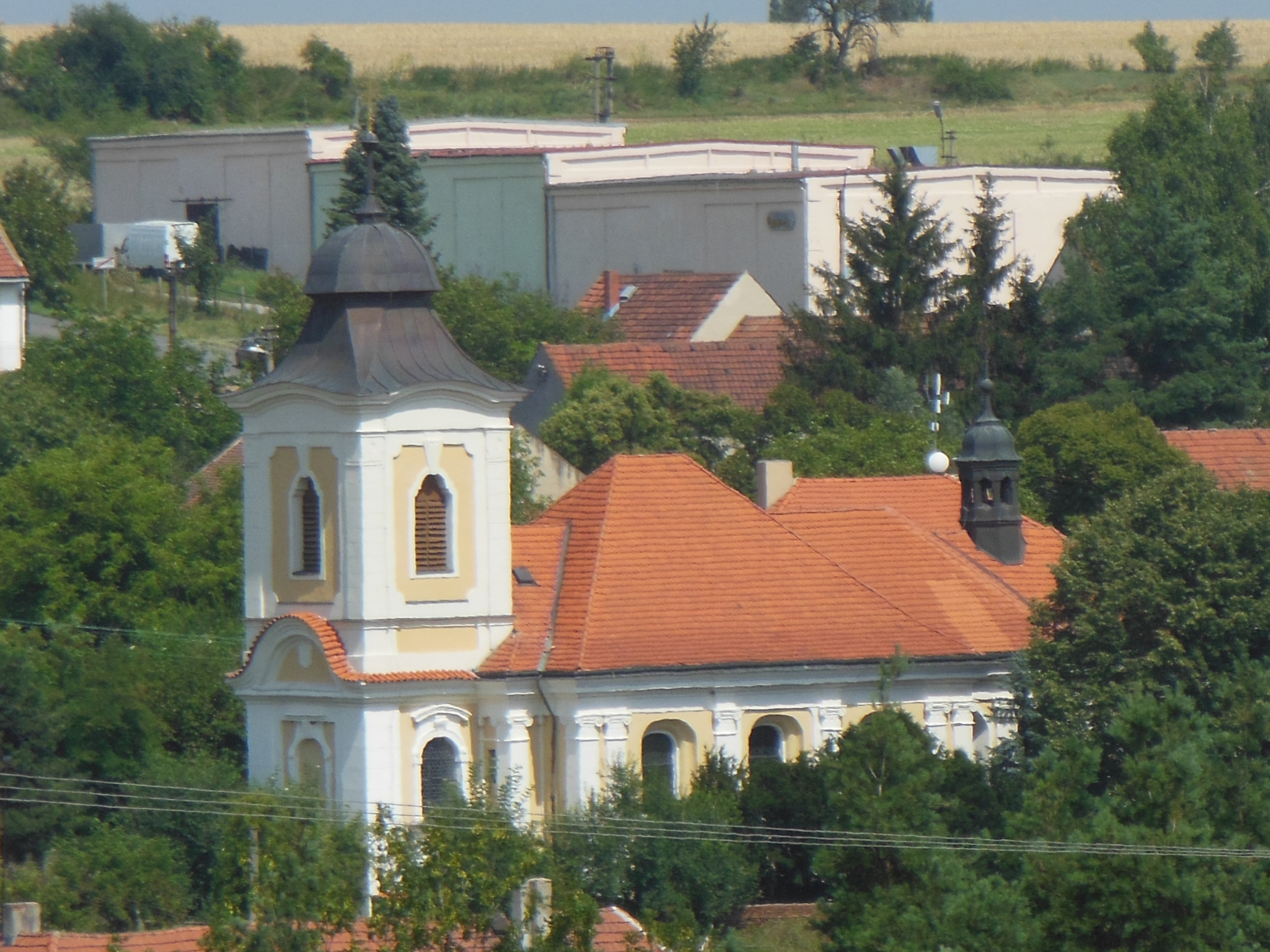 Kostel Nanebevzetí Panny Marie v Úněticích (okr. Praha-západ). Pohled z ulice Rýznerova.